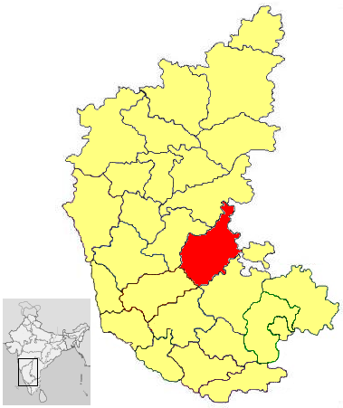 Chitradurga district in Karnataka